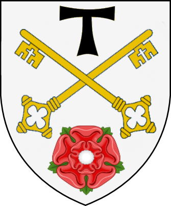 Escut de Reus de 1541 que hi ha al Prioral de Sant Pere